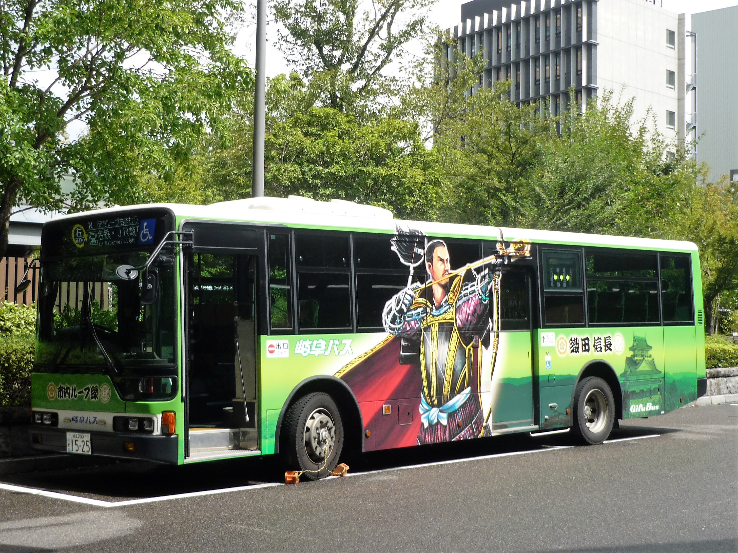 JR岐阜駅バスターミナルに停車中の岐阜バス市内ループ線（織田信長カラー） Panasonic Lumix DMC-FS3